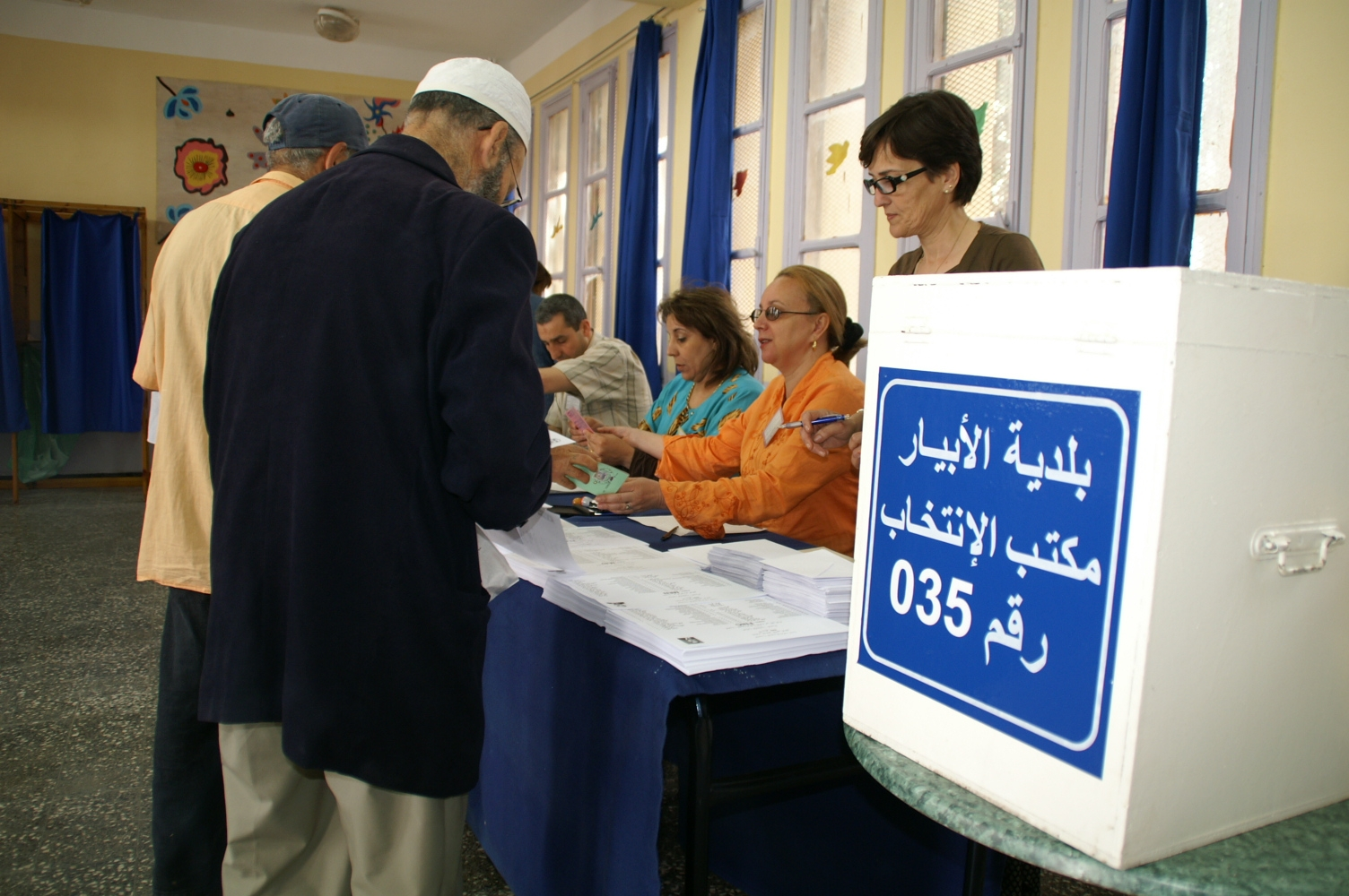 Secular parties are set to dominate Algeria's upcoming legislative elections amid boycott threats from Islamists. من المرتقب أن تهيمن الأحزاب العلمانية على الانتخابات المحلية وسط تهديدات بالمقاطعة من قبل الإسلاميين. Les partis laïcs devraient dominer les prochaines élections législatives en Algérie, dans un contexte de menace de boycott de la part des islamistes.